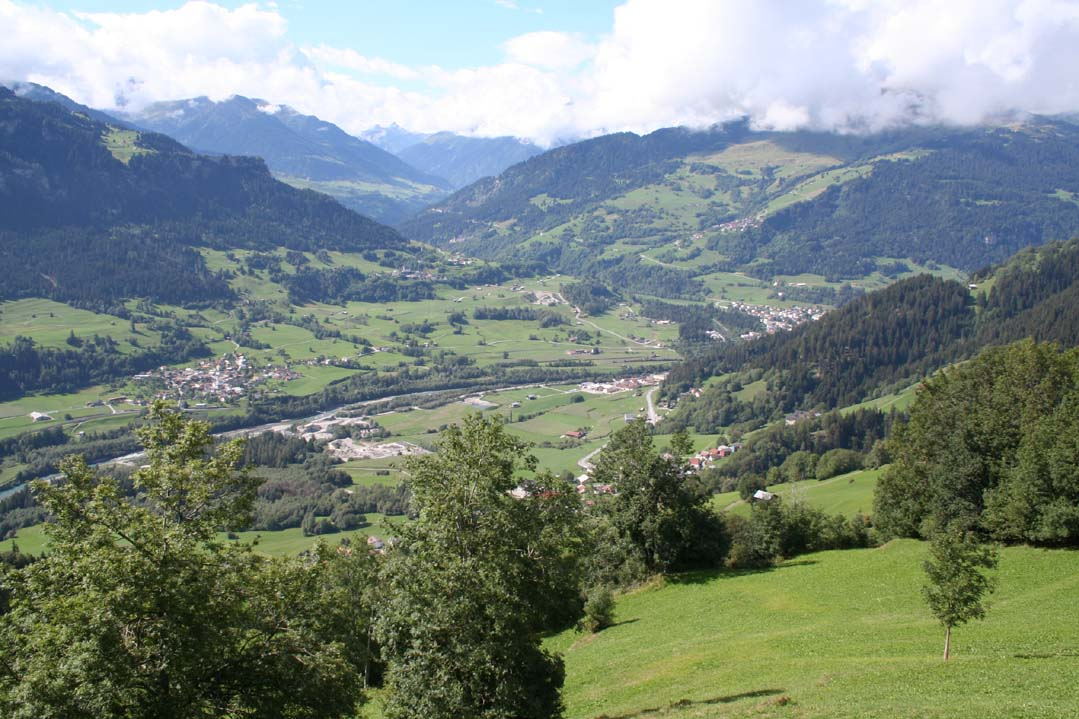 Die Surselva bei Ilanz; links Castrisch